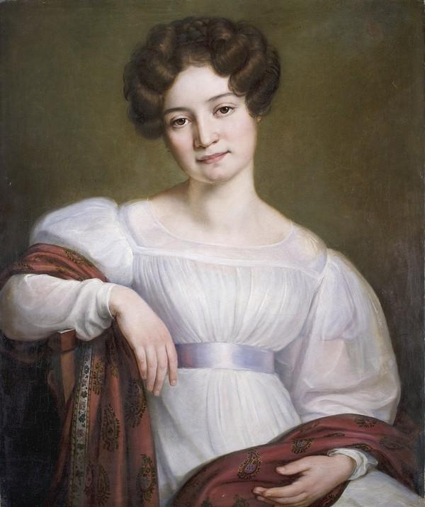 живописный портрет Марии Николаевны Раевской (кисти неизвестного художника первой половины XIX века)